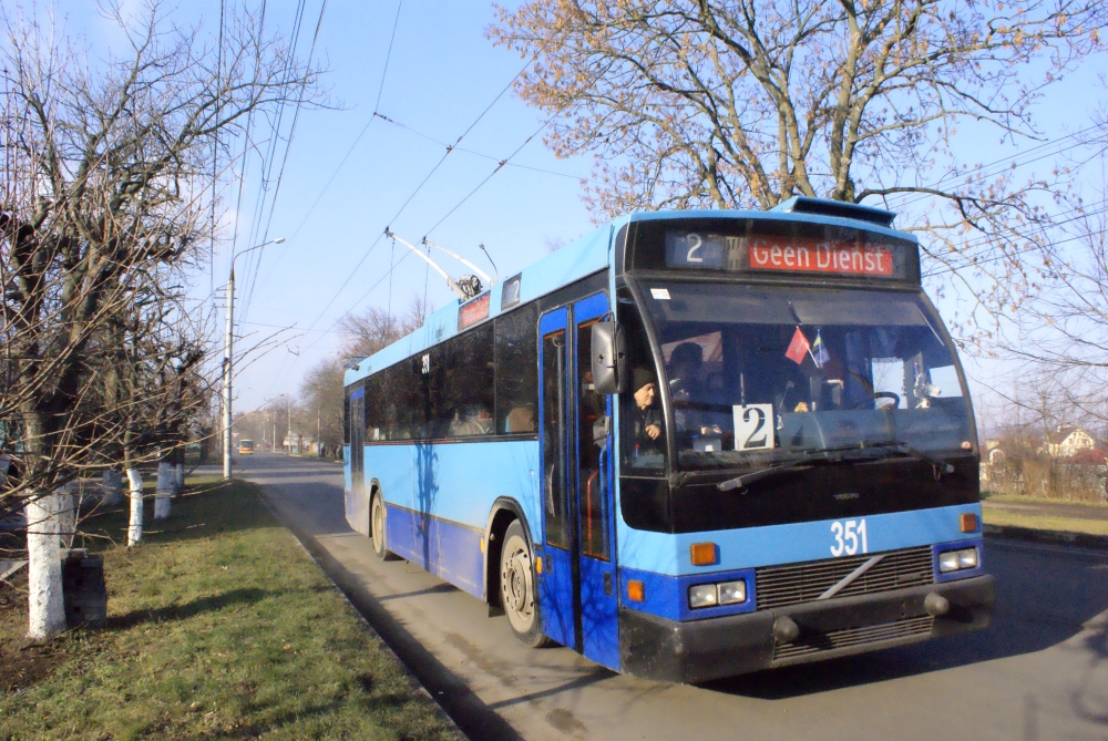 Volvo B10M-58-E №351 з Арнема, вул.Руська: Volvo B10M-58-E №351 з Арнема, вул.Руська, Чернівці.